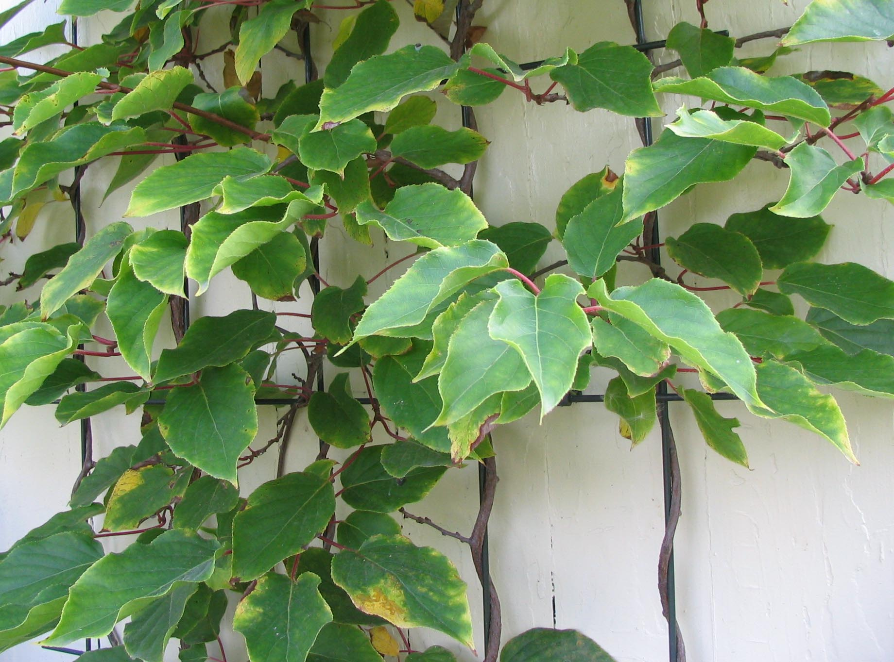 Kiwi als Kletterpflanze: Kleinwüchsige Kiwi (Actinidia arguta).